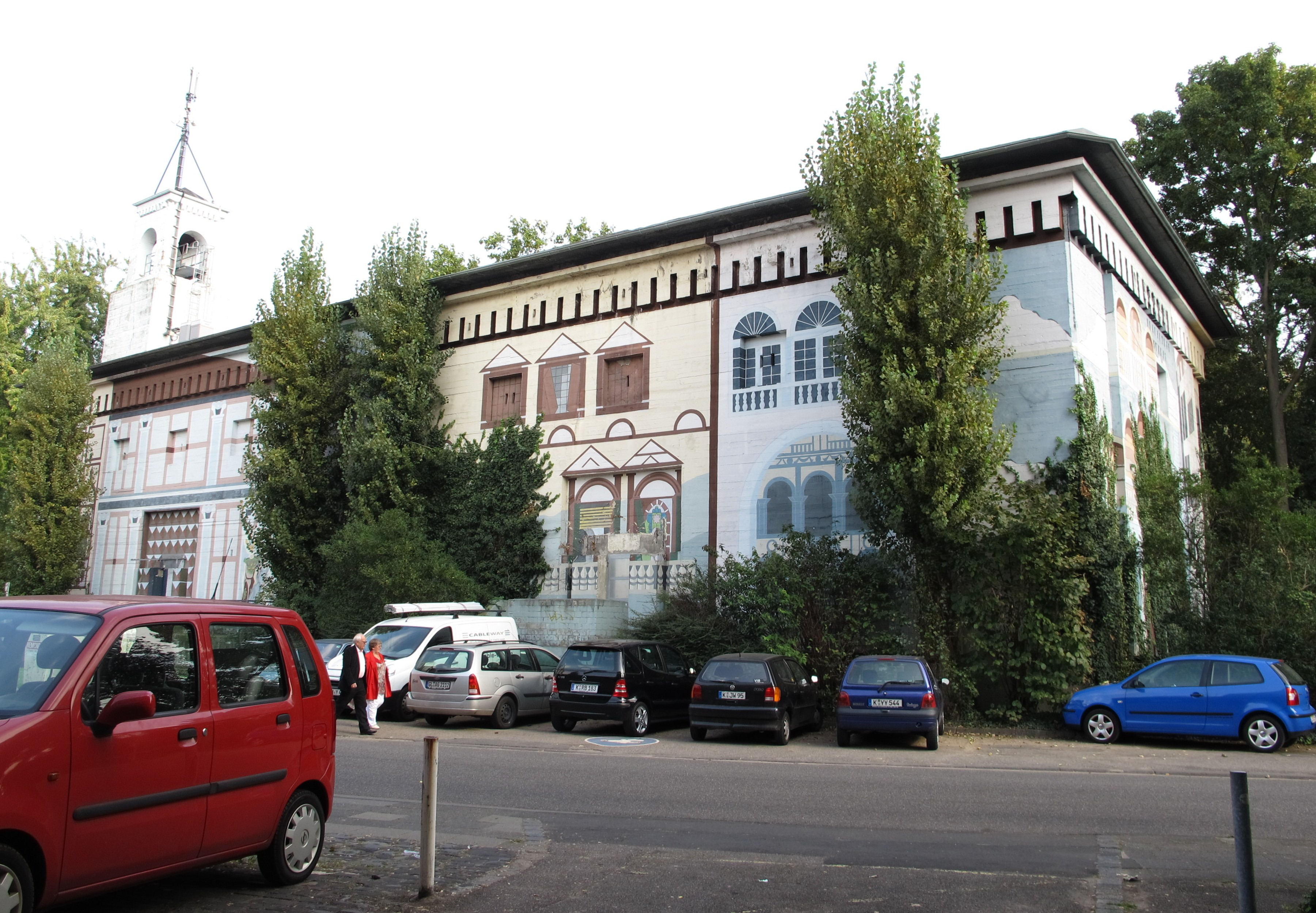 Bunker, Köln-Deutz, Helenenwallstraße 21-29This is a photograph of an architectural monument.